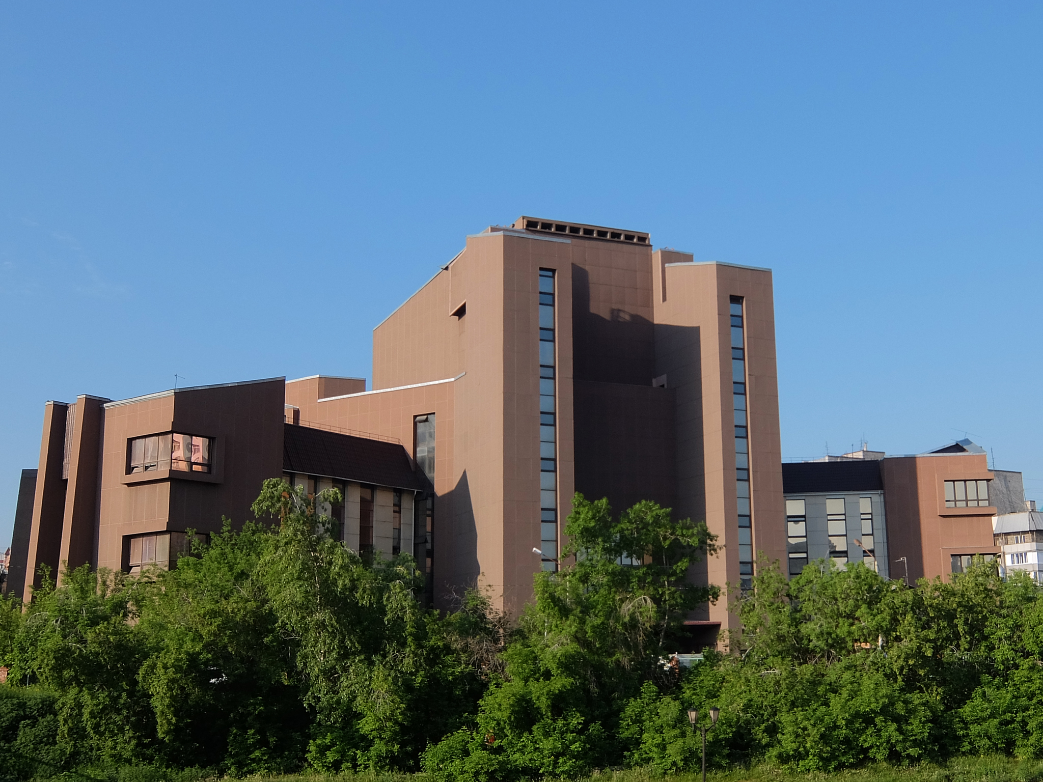 Вид на главный корпус Красноярского государственного института искусств (КГИИ) с левого берега р.Кача